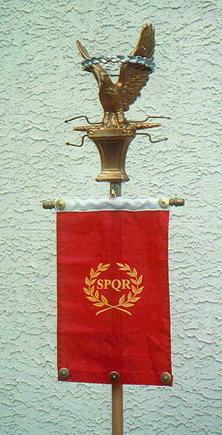 Een Romeinse banier met daaraan de Romeinse vlag. Ook het SPQR en de adelaar zijn typerend.